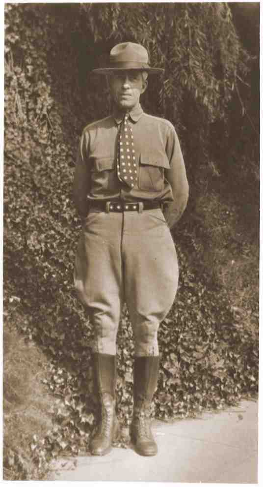 General Emil Lewis Holmdahl